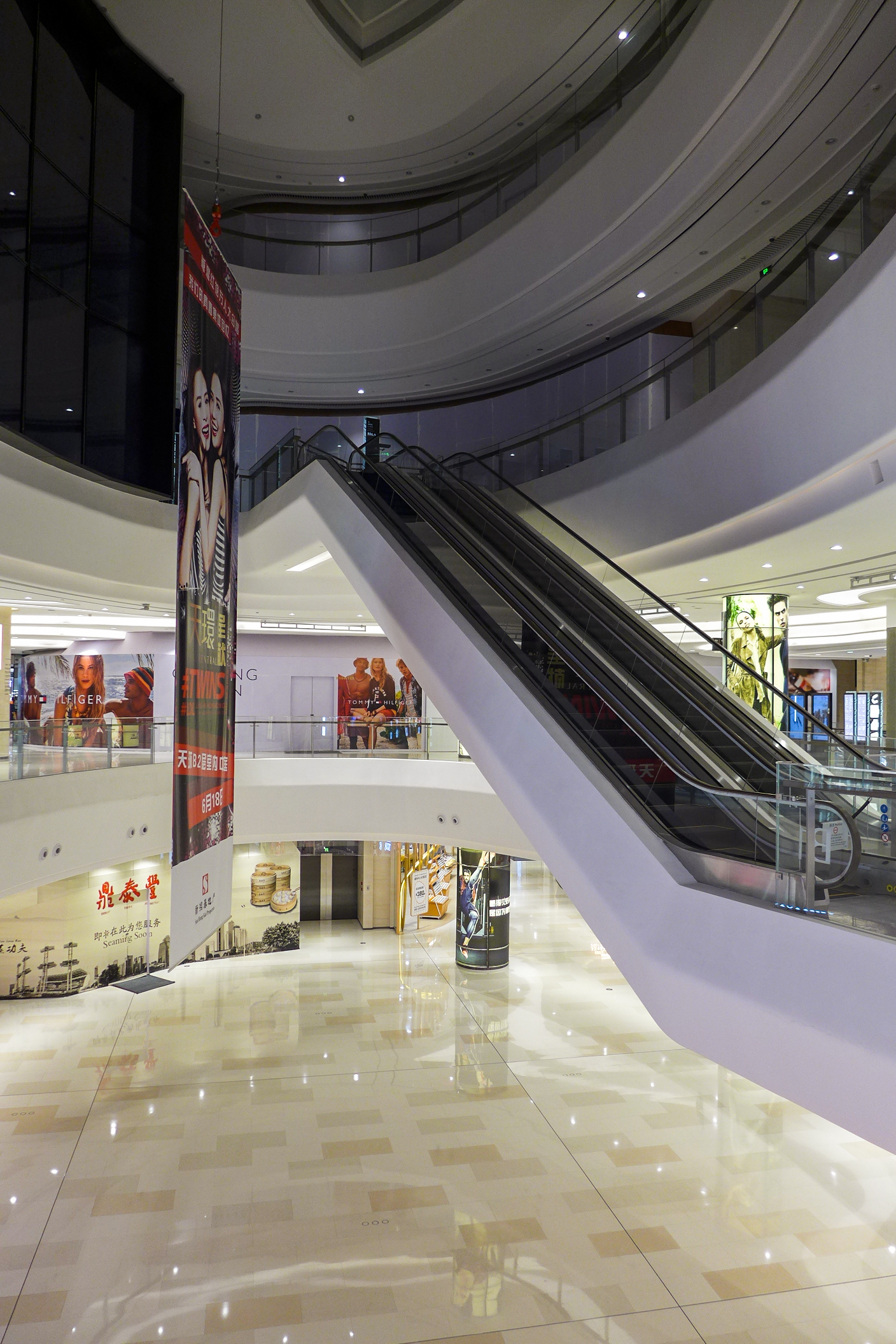 Parc Central Atrium